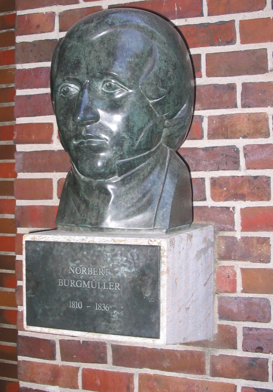 Büste Robert Schumann, Komponist, vor der Tonhalle Düsseldorf. Eine von vier dort aufgestellten Büsten von Franz Küsters.